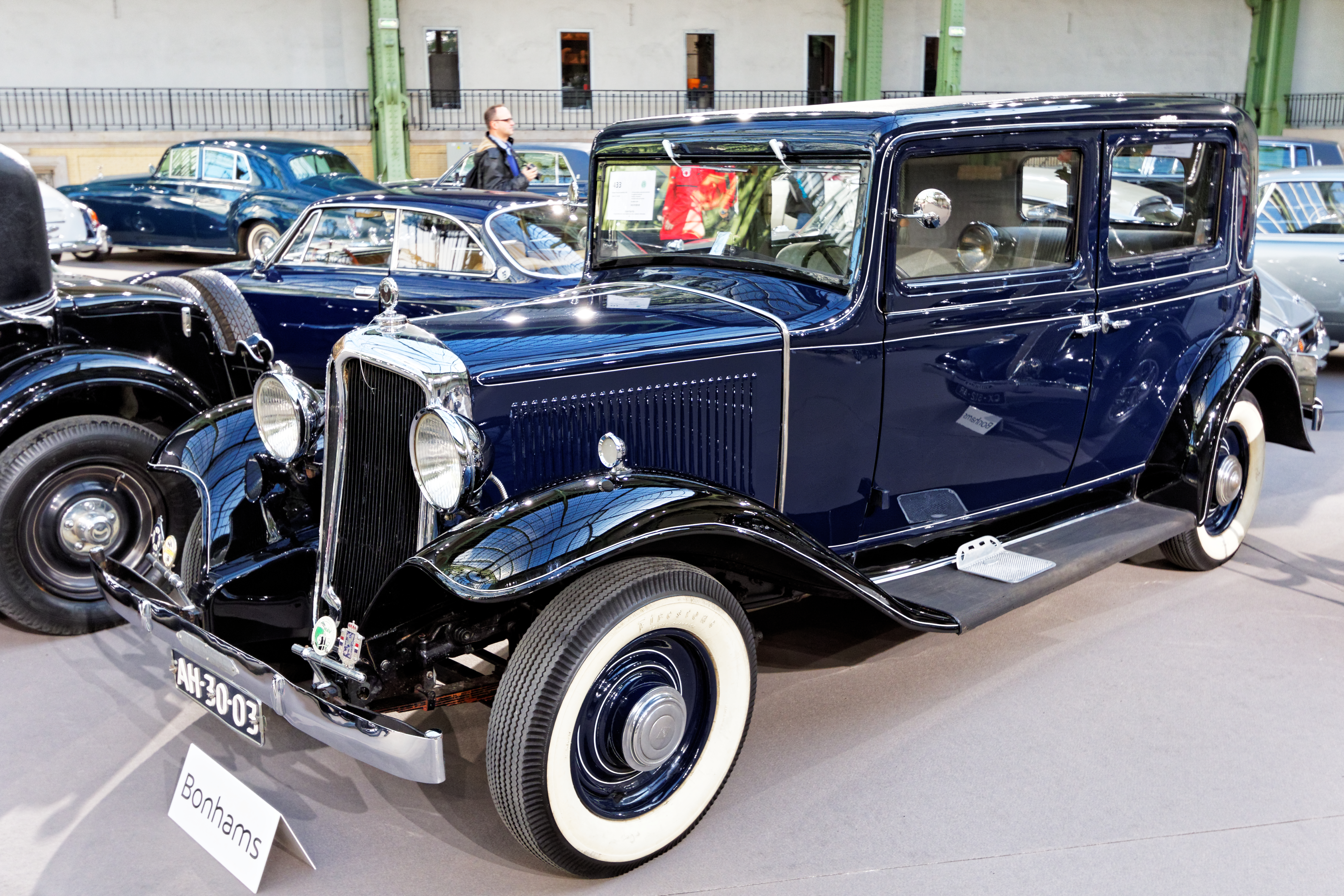 Un des véhicules présenté lors de la vente aux enchères Bonhams 2016 au Grand Palais de Paris.